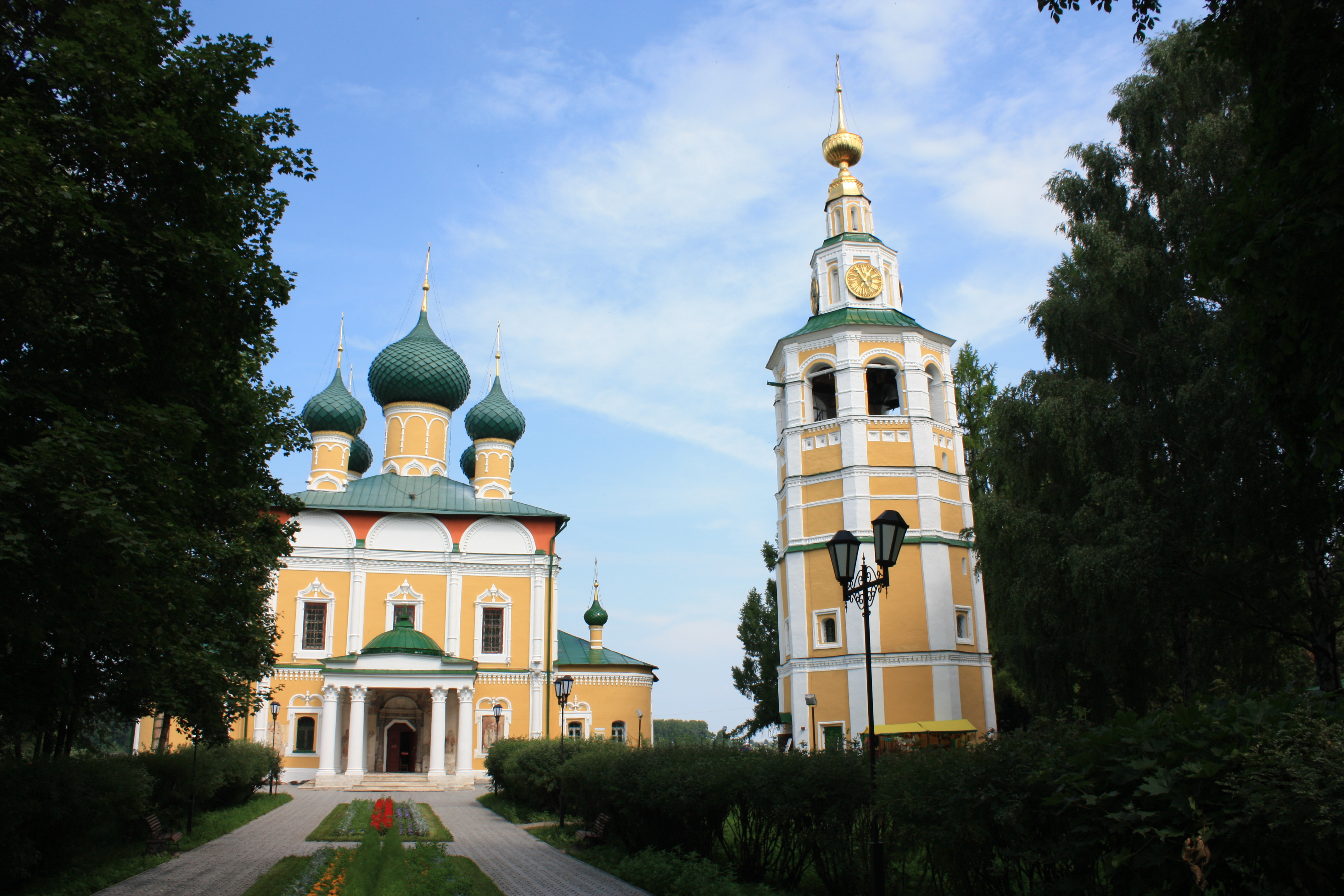 Угличский историко-художественный музей (музейный комплекс) (Ярославская область, Углич, город Углич)